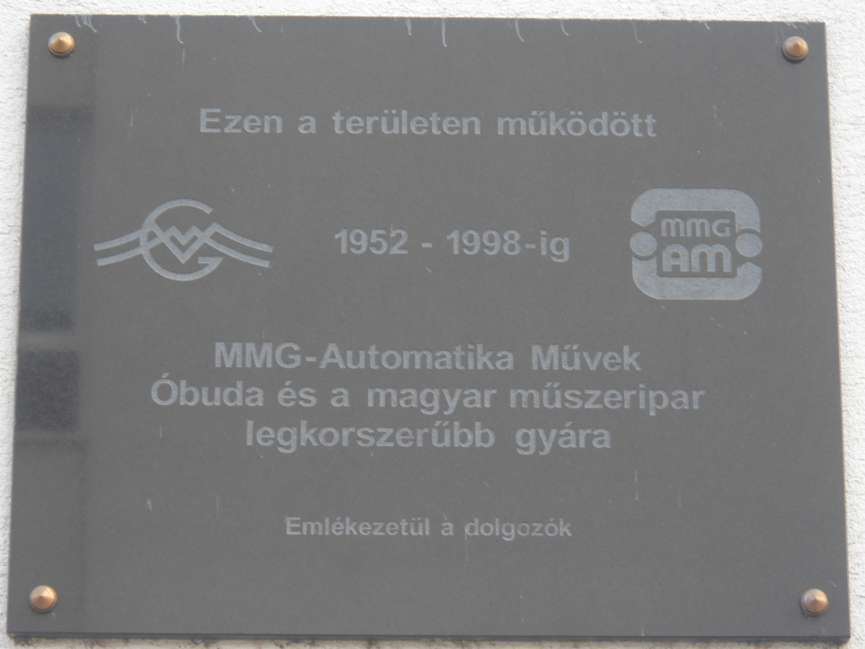 MMG-Automatika Művek emléktáblája, Budapest, III., Montevideó utca 3.